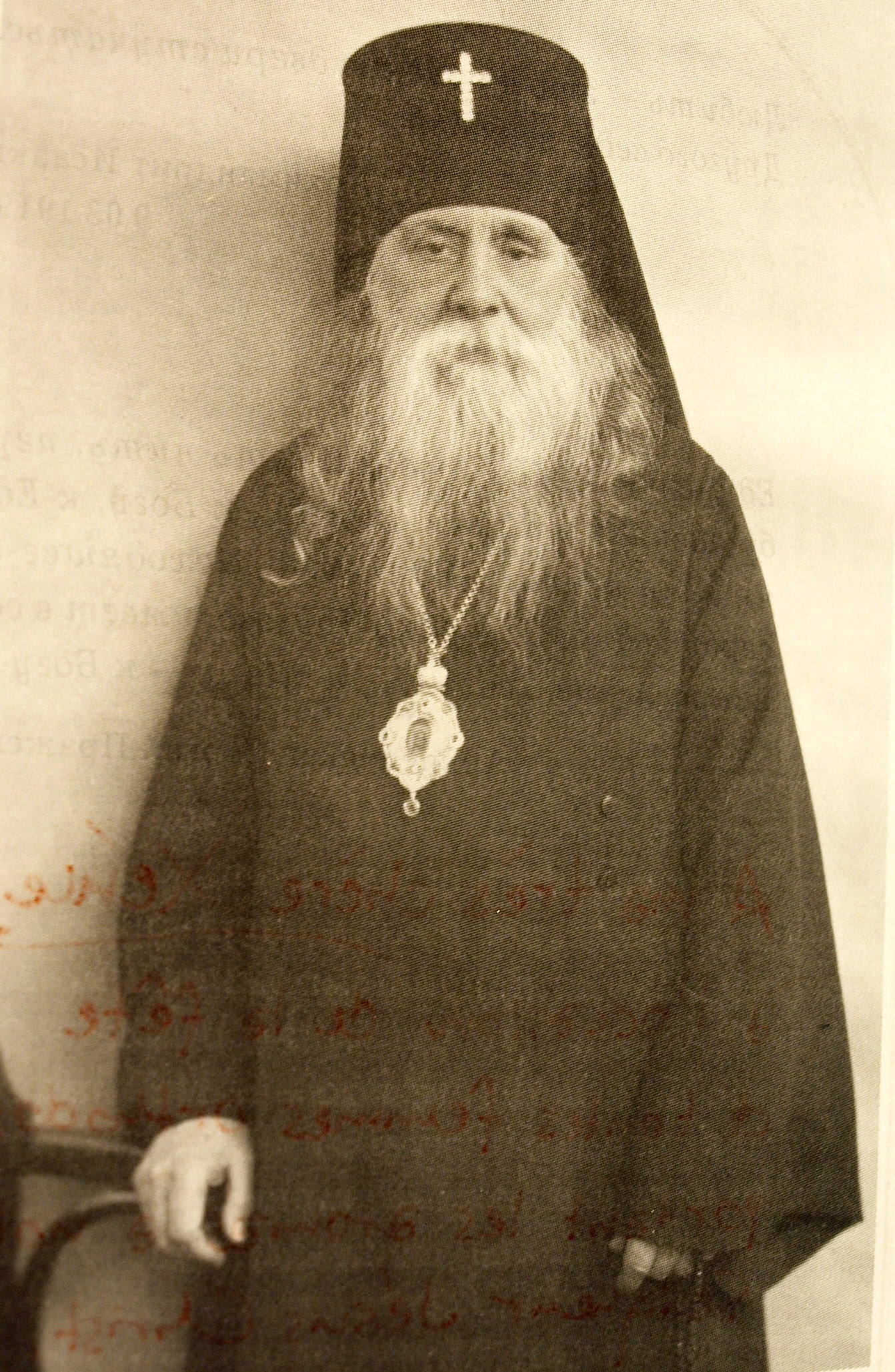 Biskup Sergij